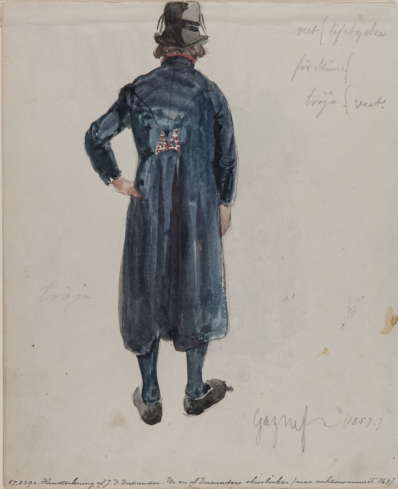 Akvarellerad handteckning av J W Wallander. Mansdräkt från Gagnef, Dalarna. Nordiska museets inv nr 57339c. Jmfr NMA.0035330. NMA.0068971.